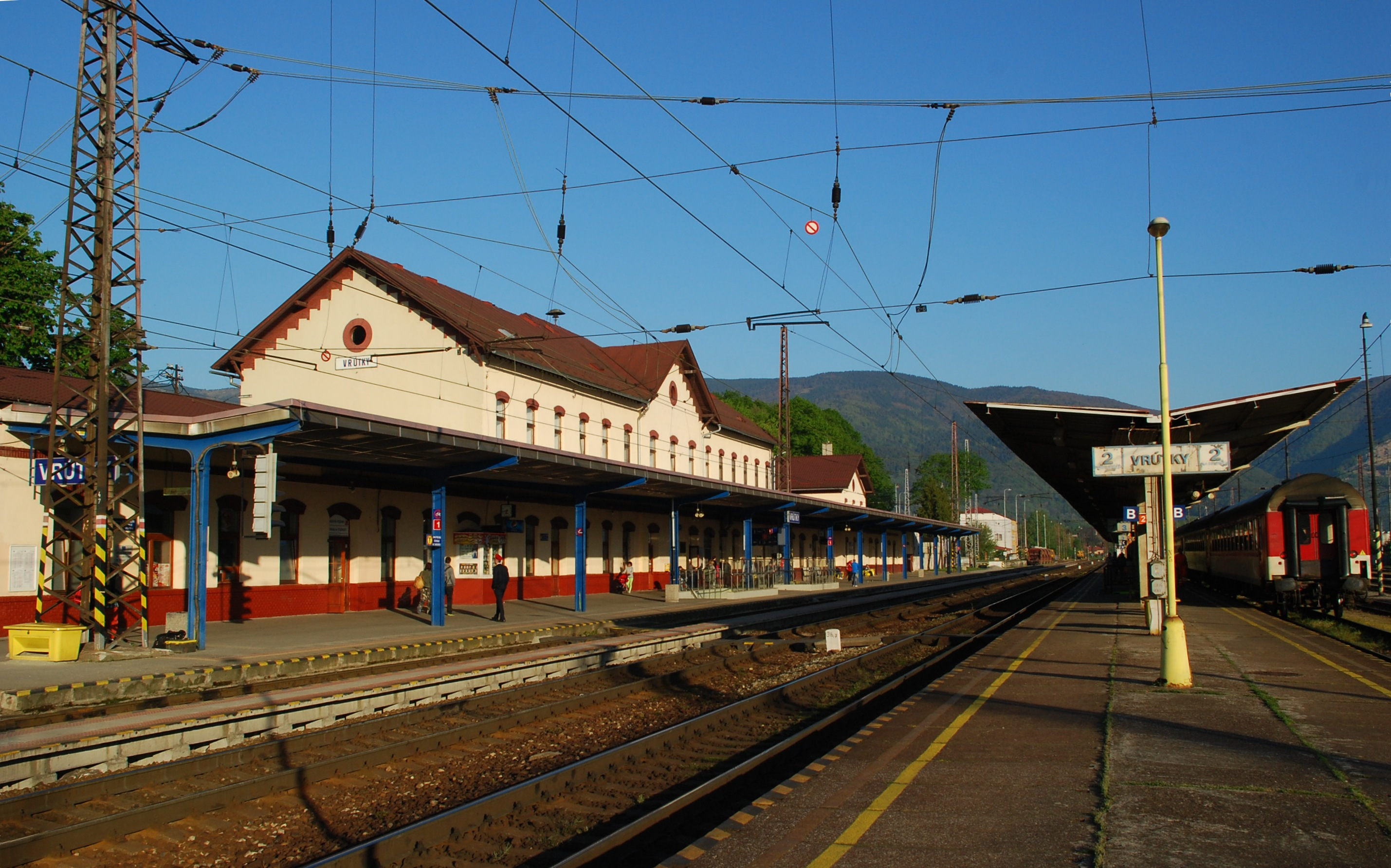 Železničná stanica Vrútky, výpravná budova a druhé nástupište